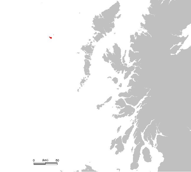 UK St Kilda.PNG (Scotland, Hebrides)